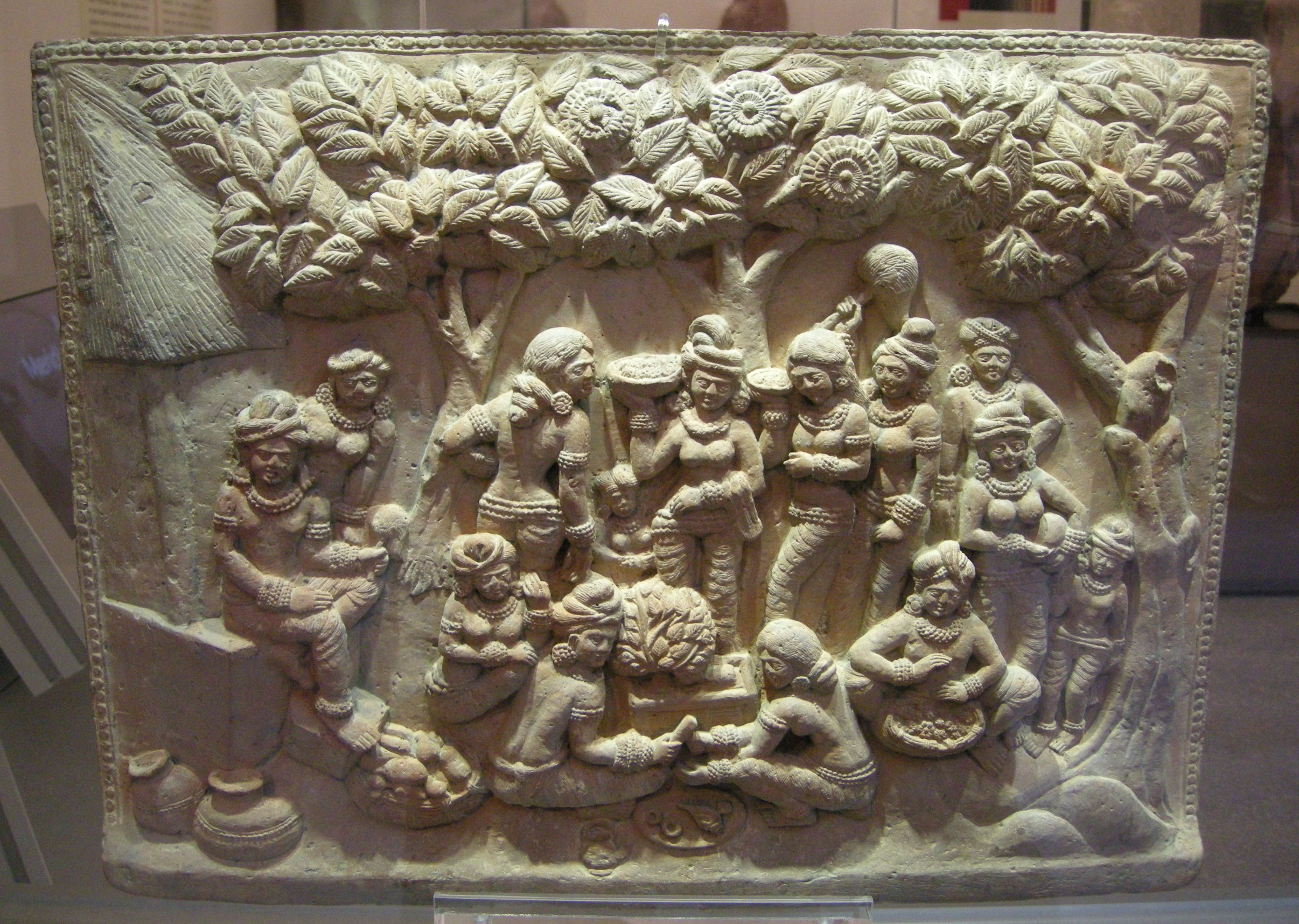 Chandraketugarth, bengala occ.le,nascita di siddharta, I sec ac.-III sec dc